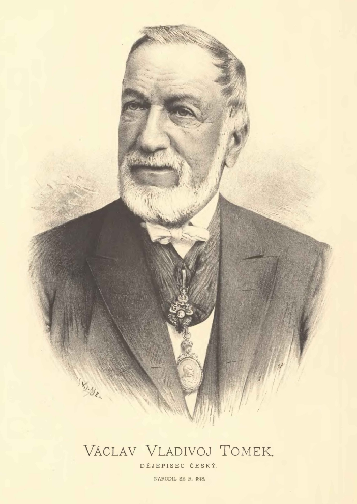 Portréty českých osobností od Jana Vilímka